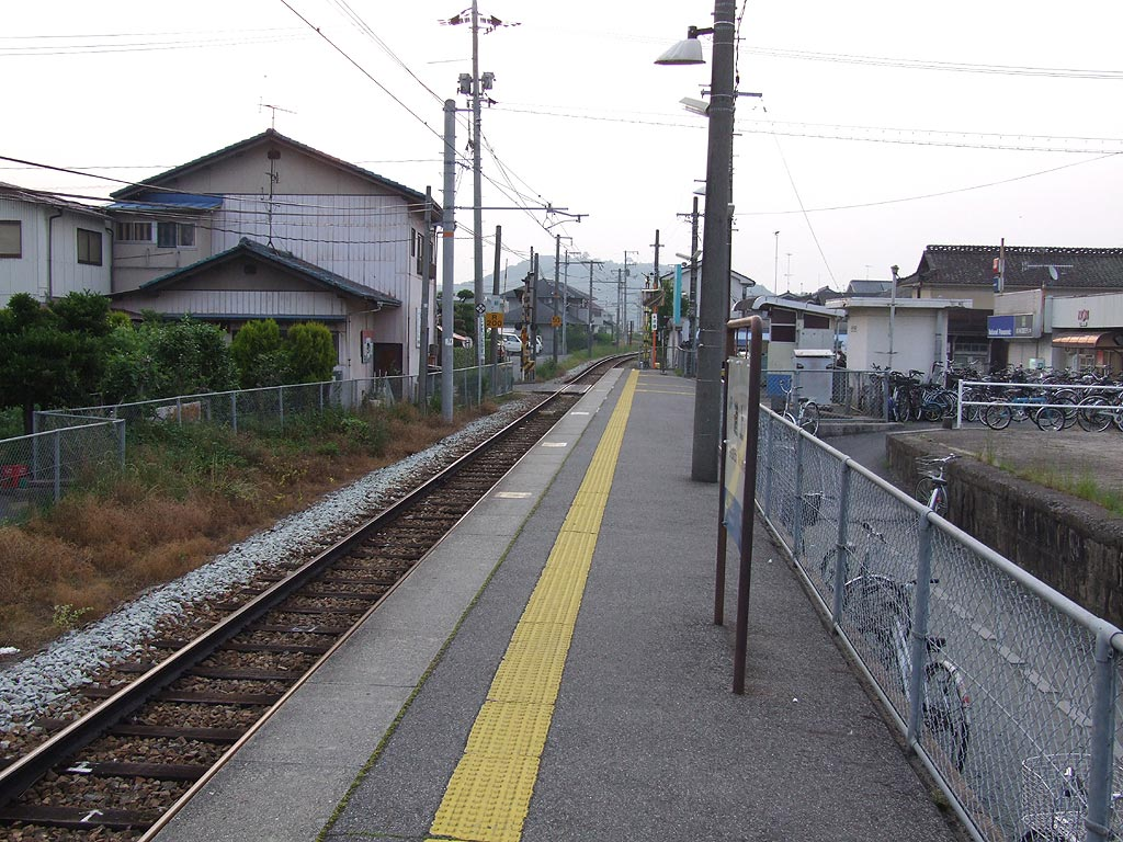 道上駅（ホームより）